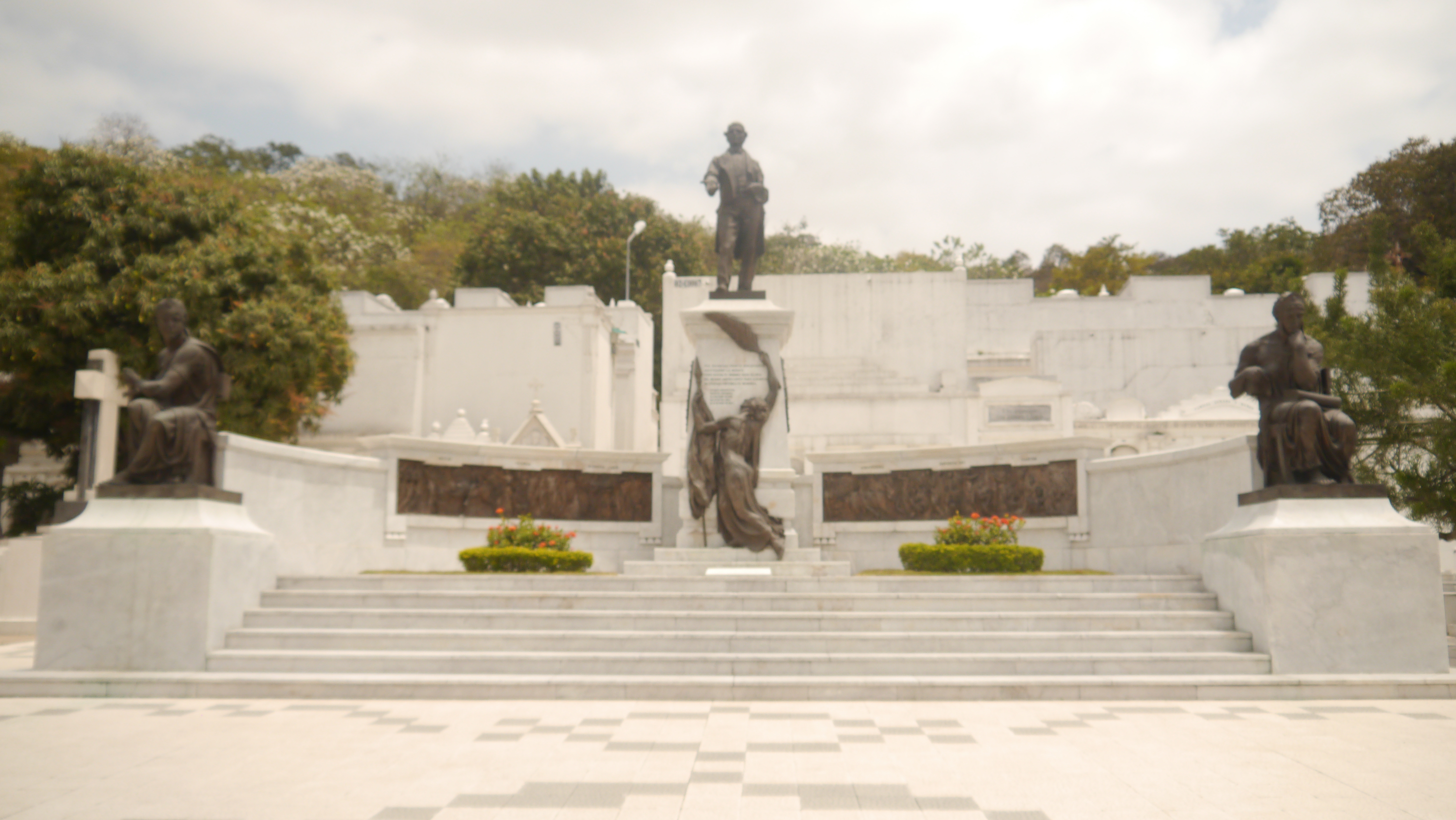 Mausoleo de Vicente Rocafuerte